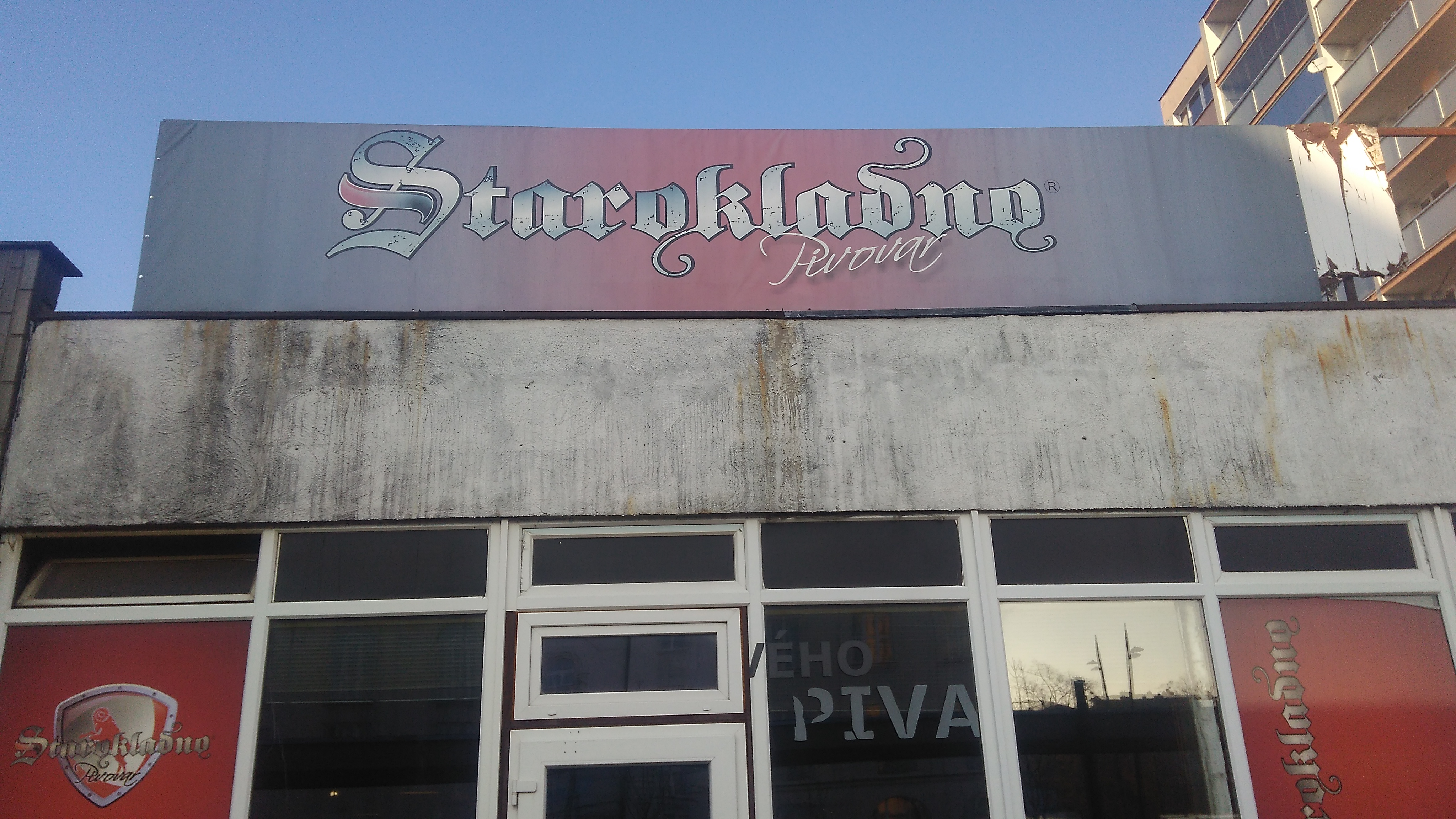 Pivovar Starokladno, ulice Čs. armády v Kladně